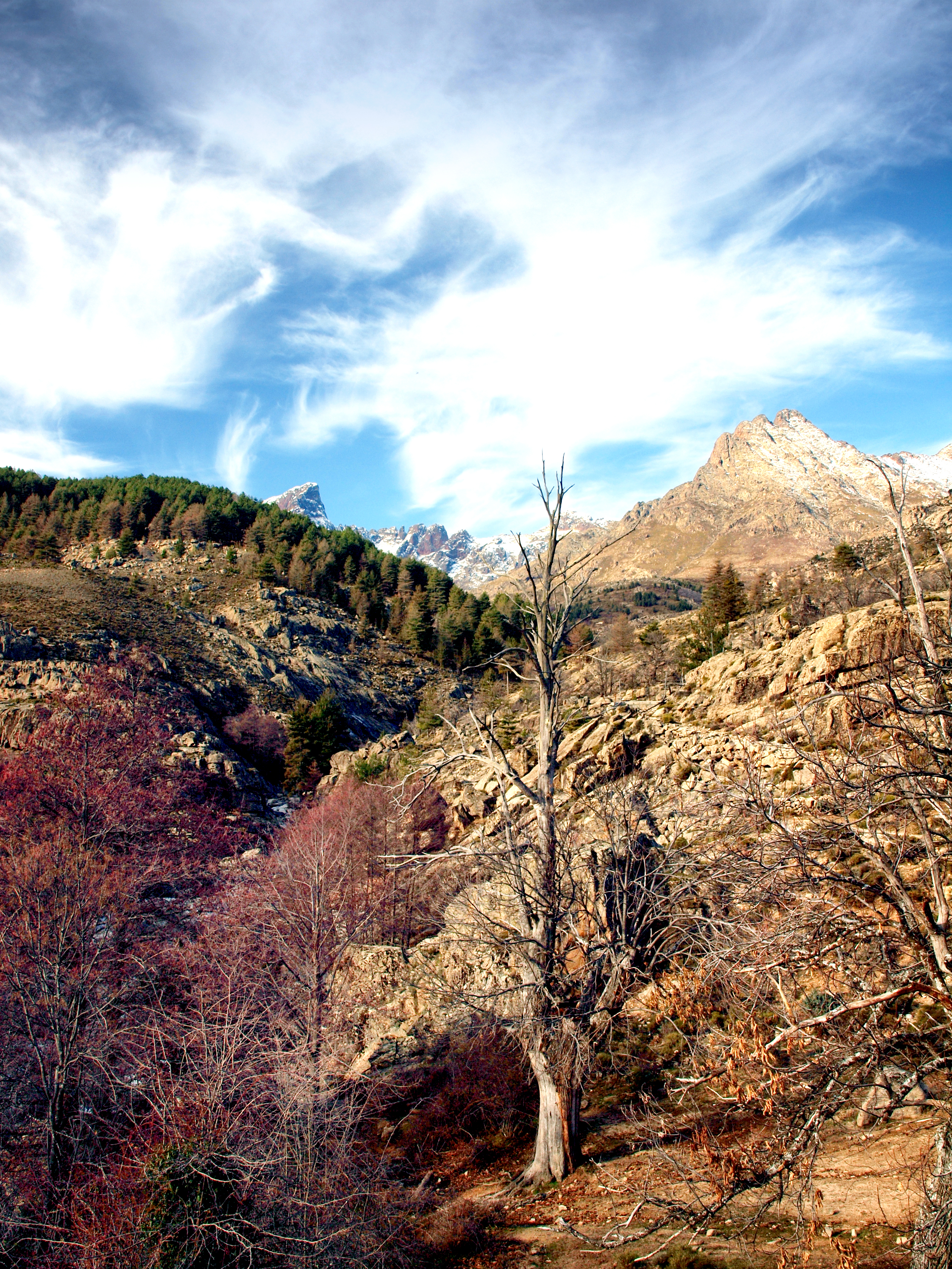 Albertacce, Niolo (Corse) - Paysage hivernal en amont du ponte Altu sur le Golo. À gauche, le lit du Viru, affluent du Golo. A l'arrière-plan, la pointe de la Pagla Orba et I Cinque Frati.